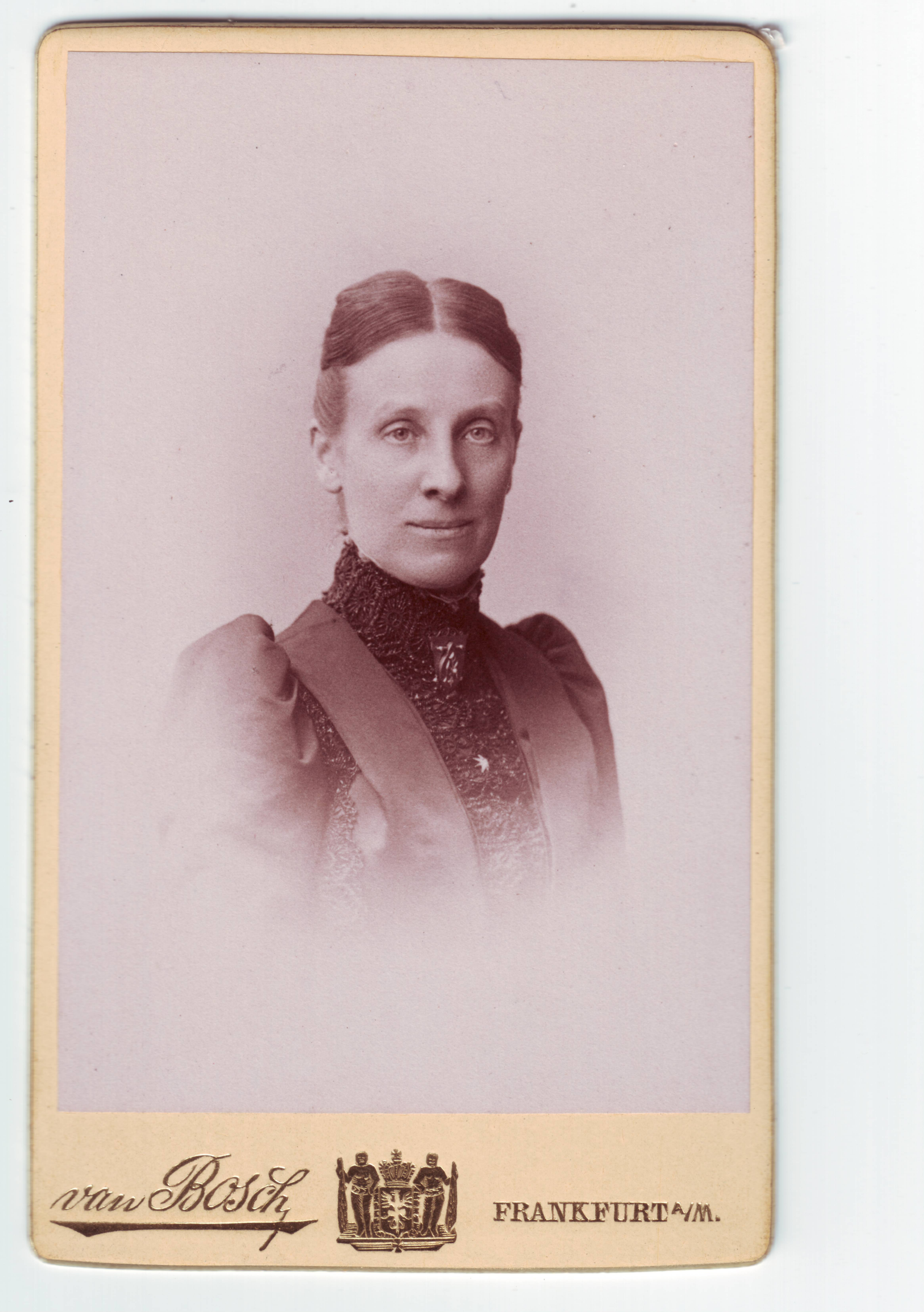 Anna Schmidt , geb. 11. April 1852, gest. 24. September 1929